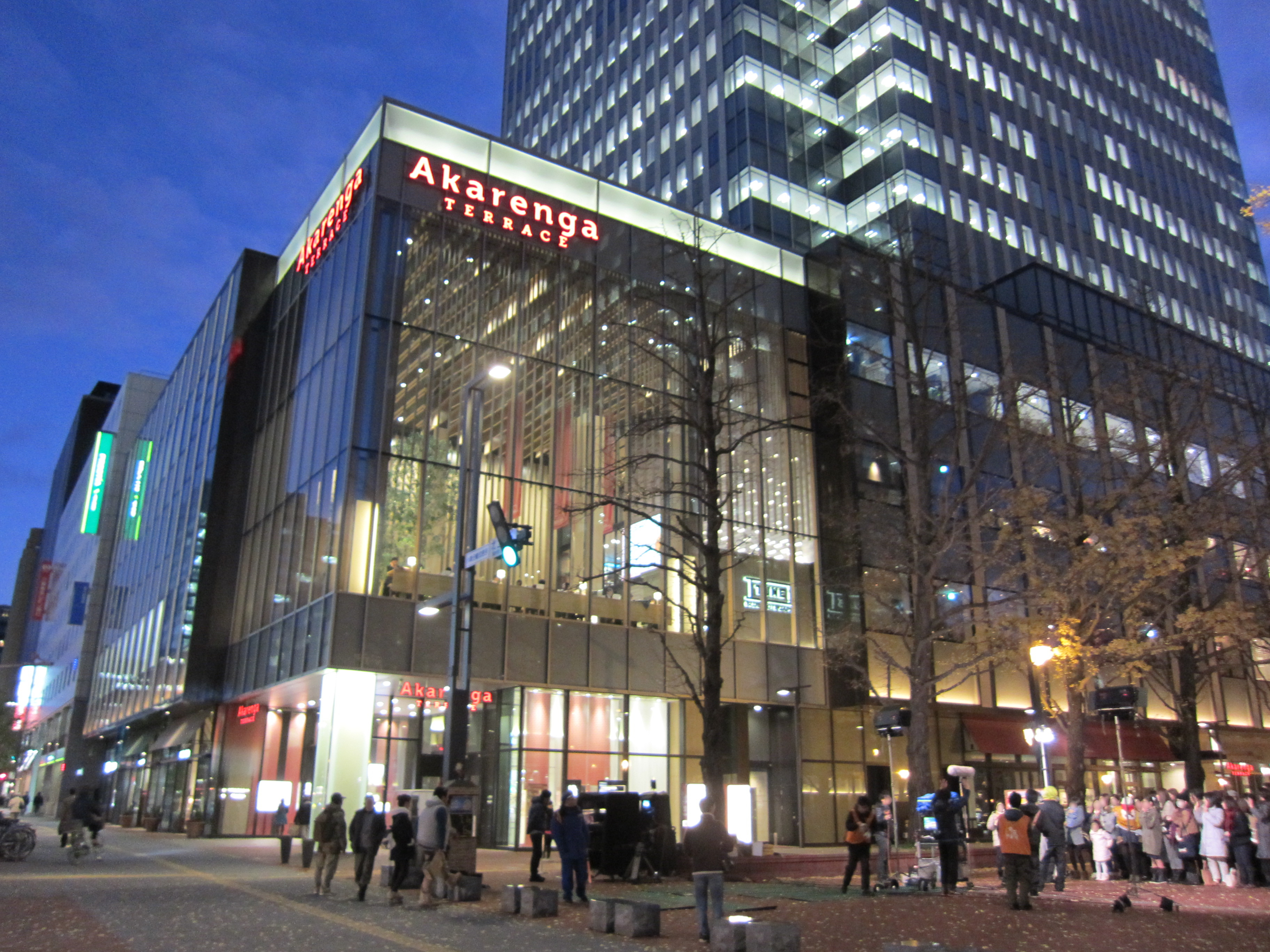 札幌市にある商業施設「赤レンガテラス」